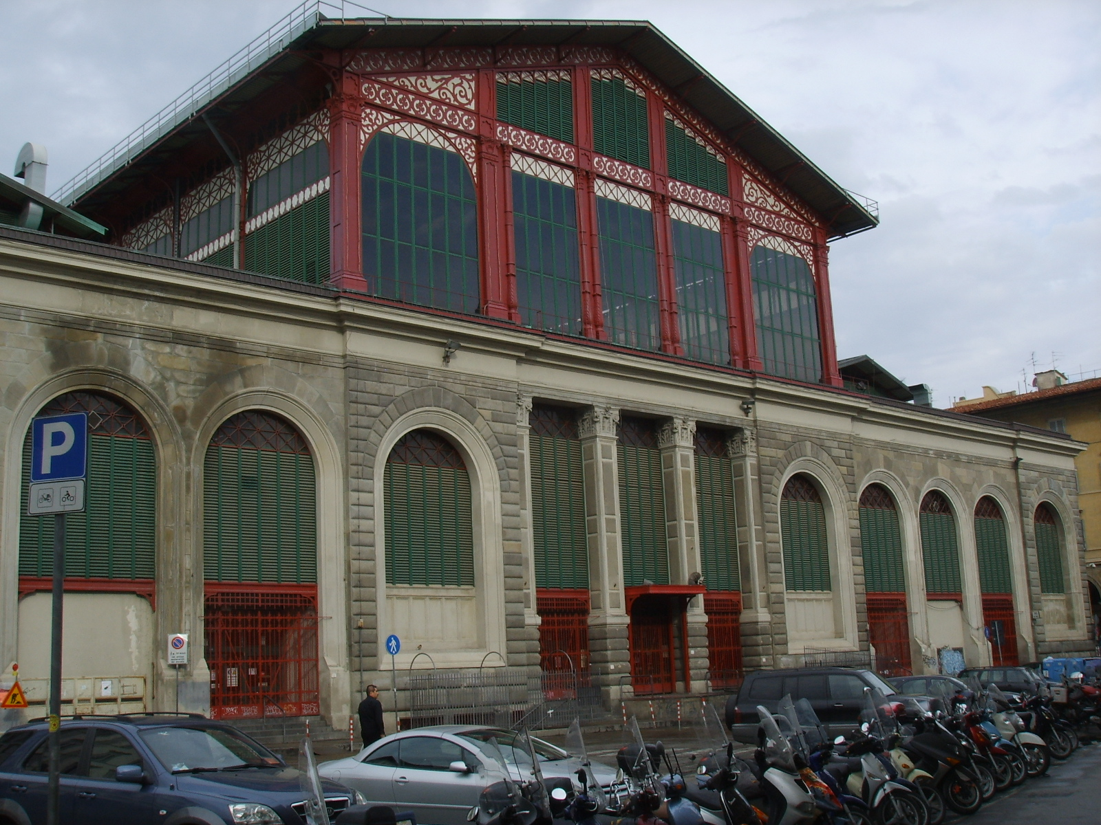 Mercato centrale di firenze